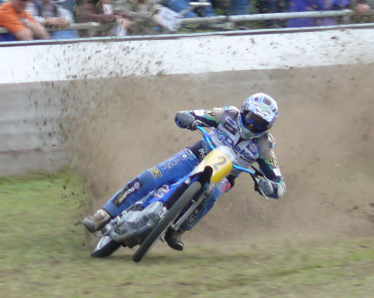 Roberth Barth 2007 Bernd Diener